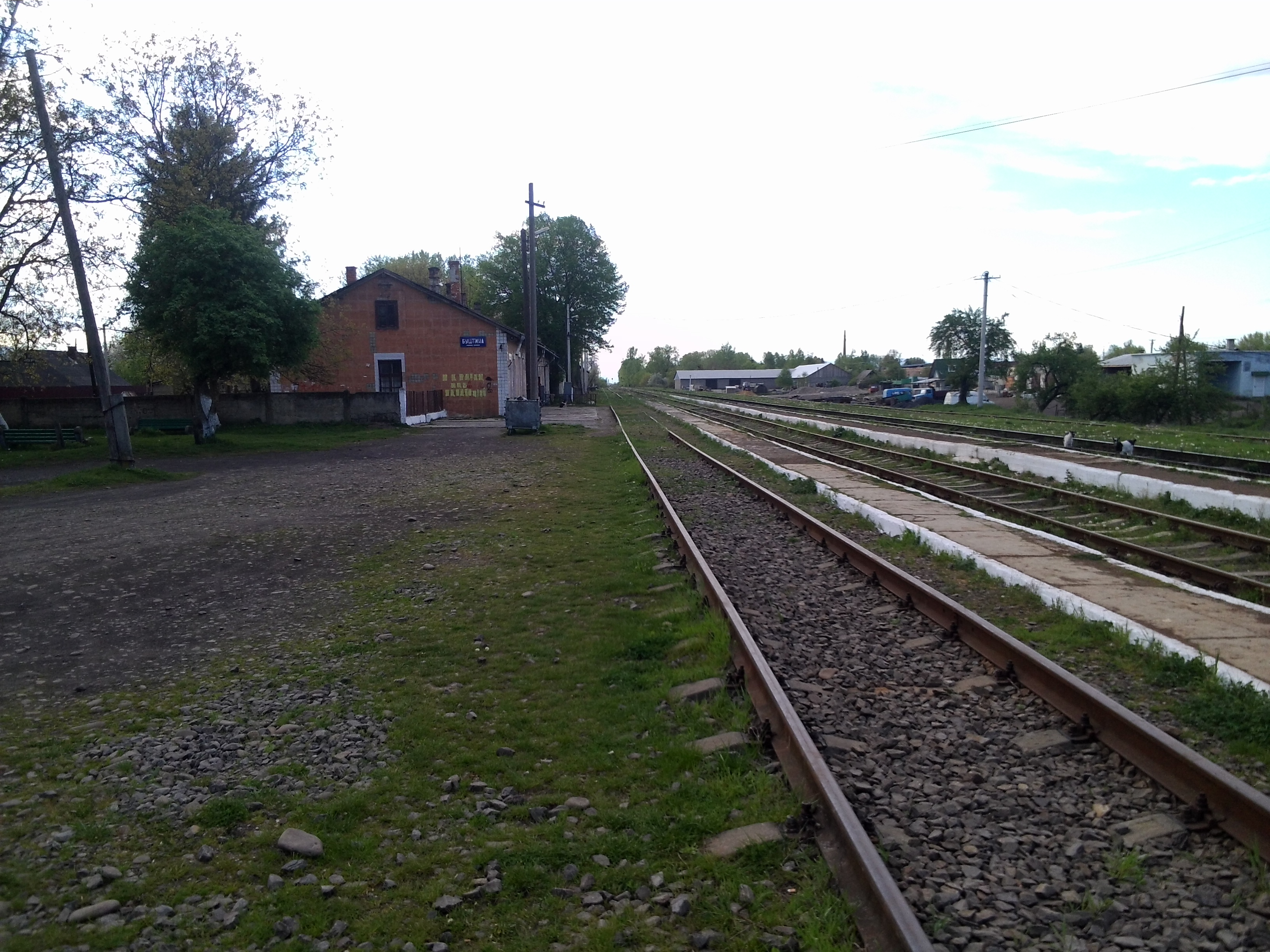 Станція Буштина